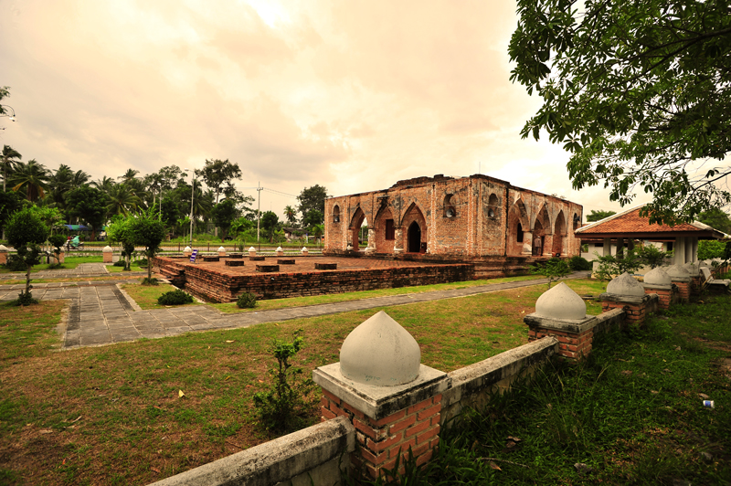 มัสยิดกรือเซะ